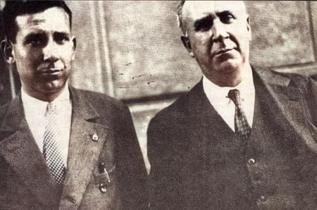 Antonio de Padua Tramullas Perales e hijo